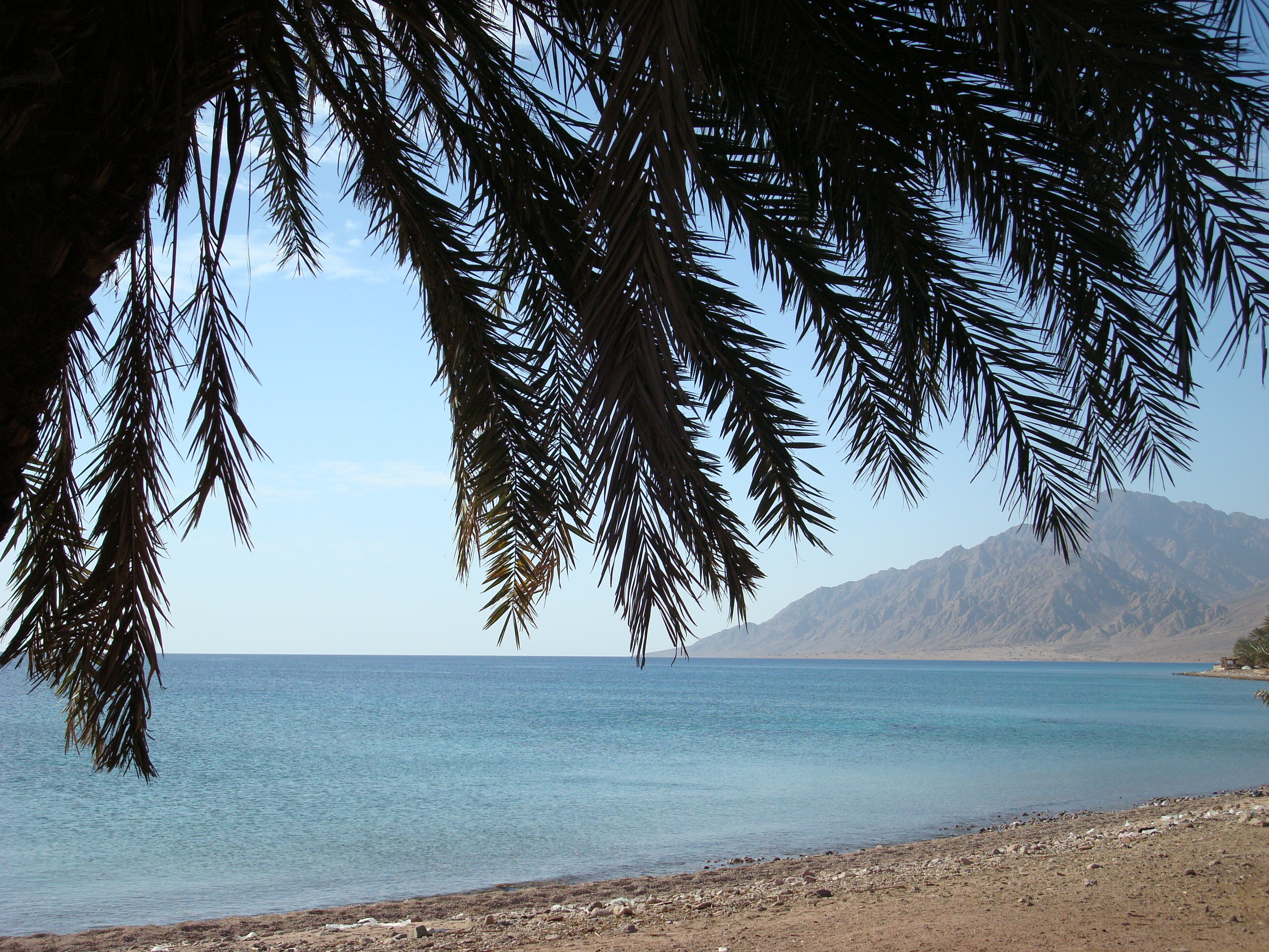 منظر طبيعي لأحد المناظر الطبيعية من نوبيع بجنوب سيناء